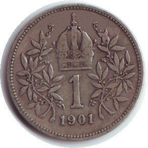 Austria 1901 1 Krone